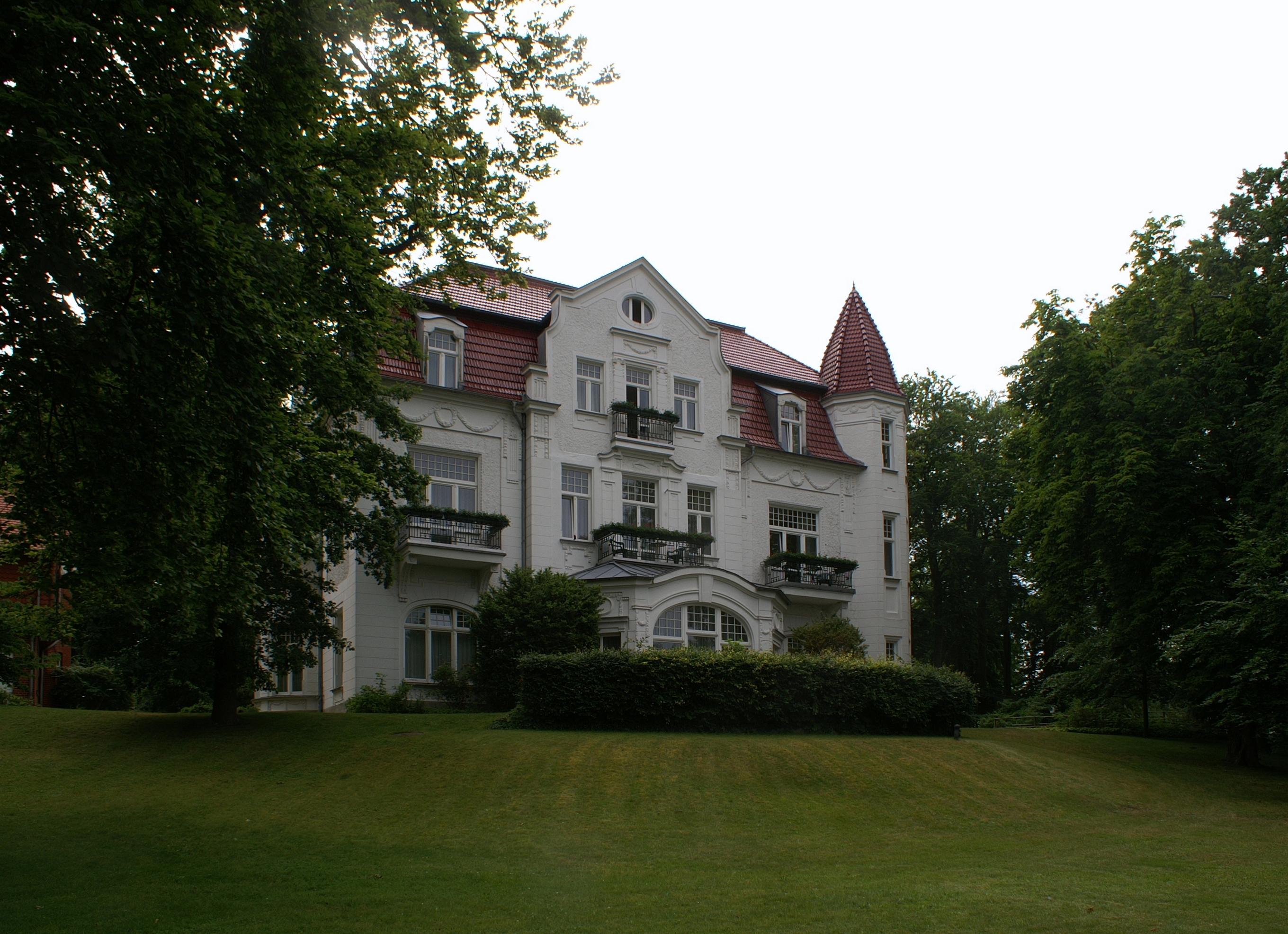 Heringsdorf, Delbrückstrasse 6, Villa Staudt von der Promenade aus gesehen.